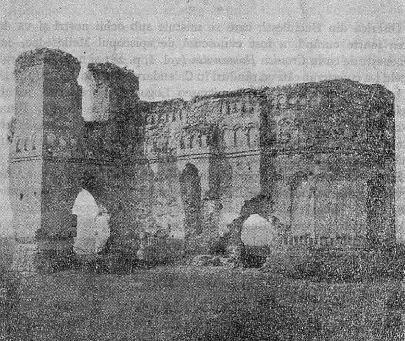 Ruinele fostei mănăstiri Bociulești